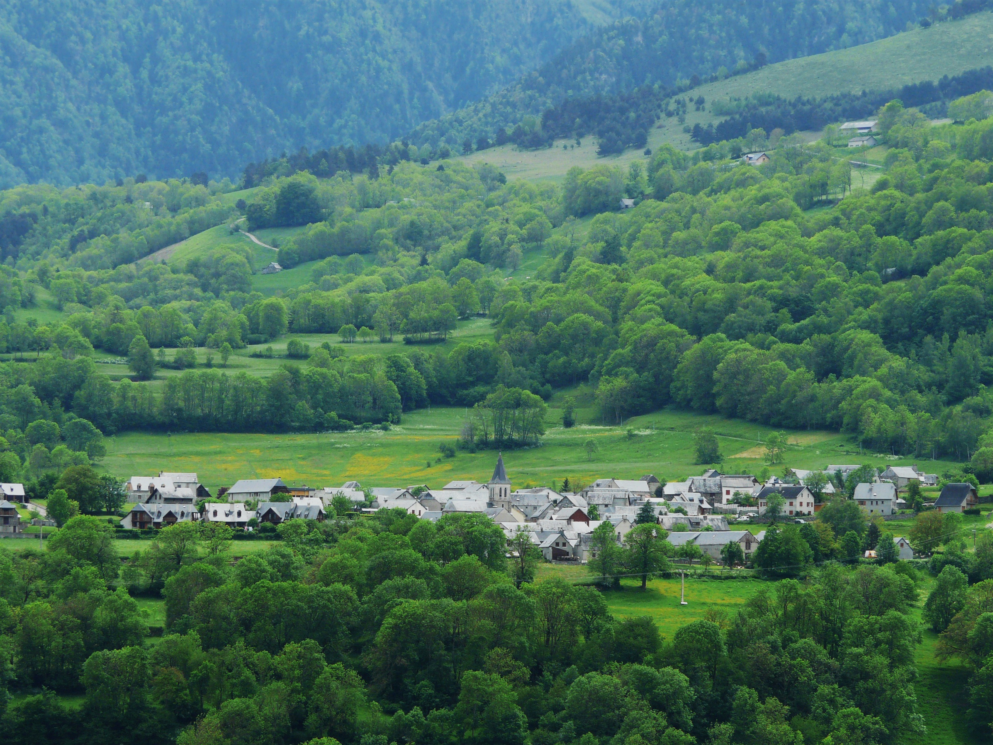 Le village de Sailhan, Hautes-Pyrénées, France.